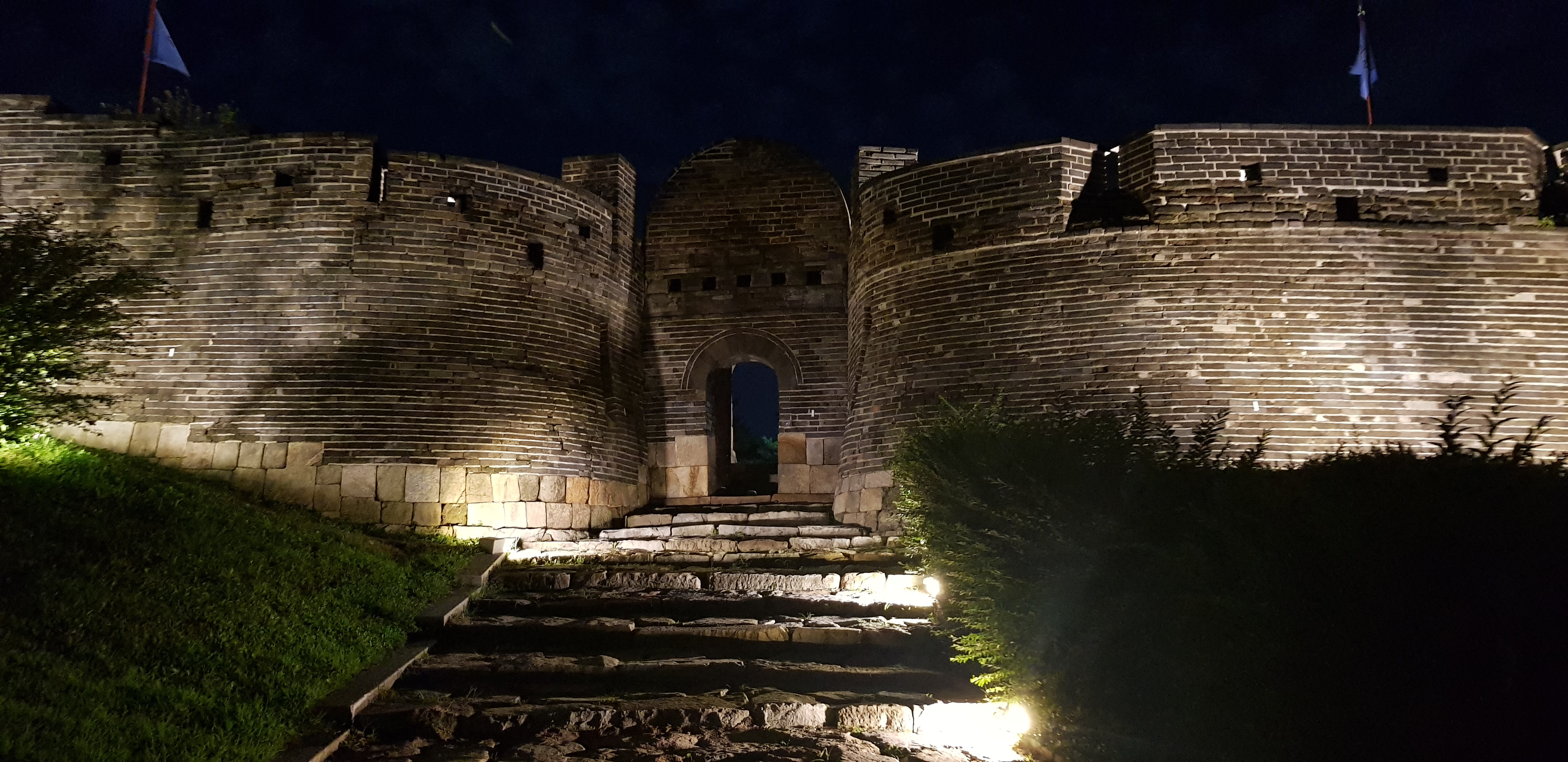 북암문 밤 밖